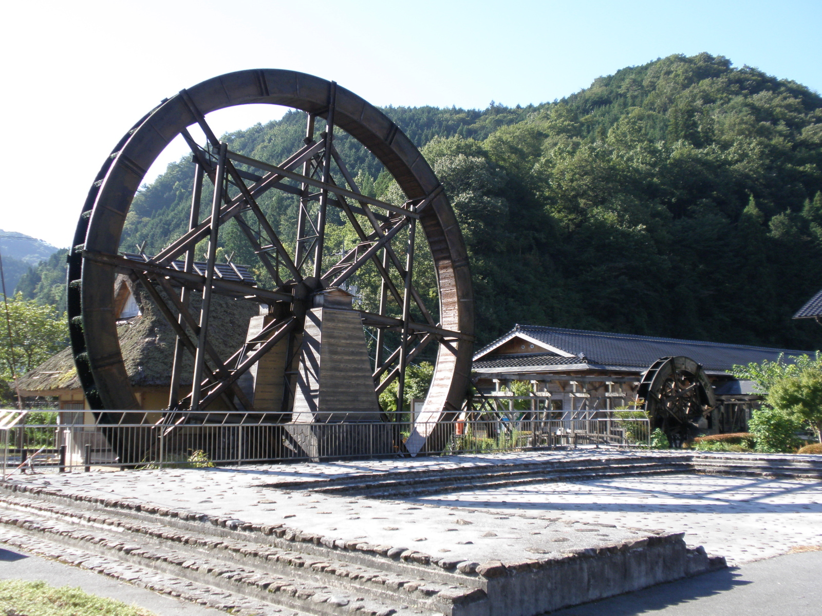 岡山県新見市にある「日本一の親子孫水車」